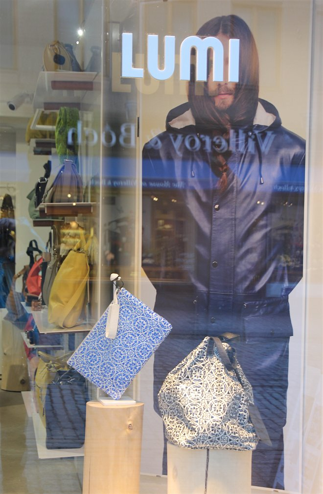 Helsingin Unionin- ja Aleksanterinkatujen kulmassa sijaitsevan Lumi-asustemyymälän ikkunaa.